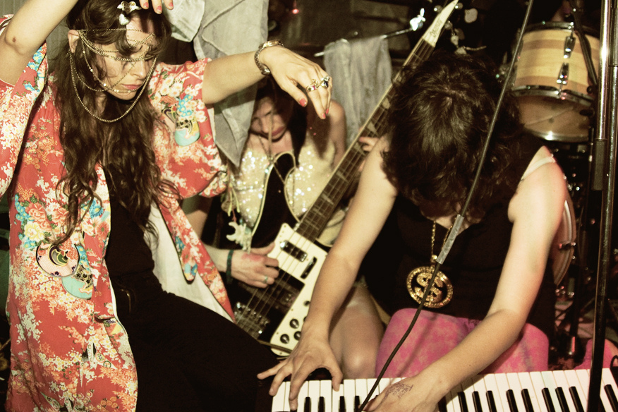 Pocahaunted